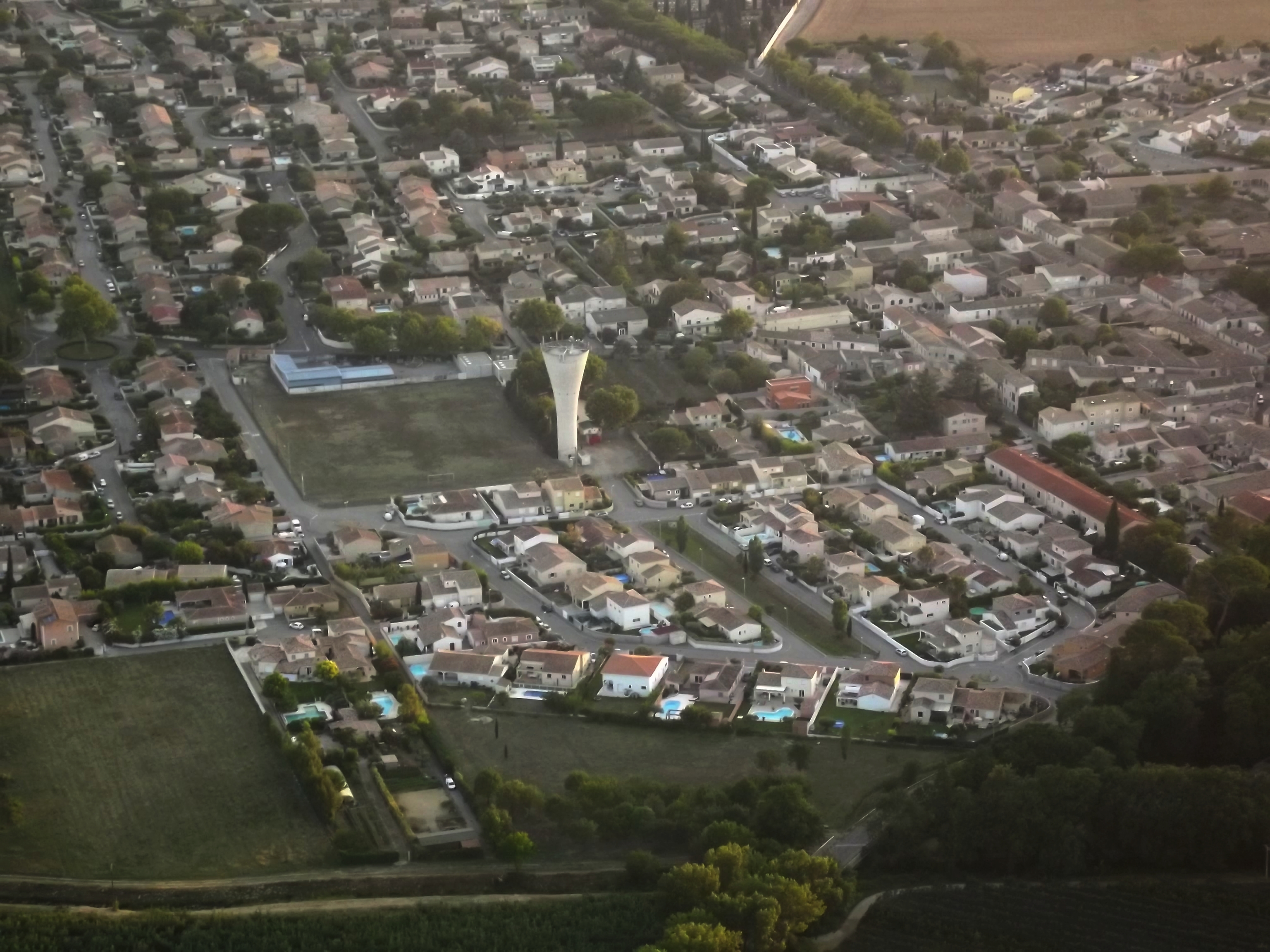 Vue Générale